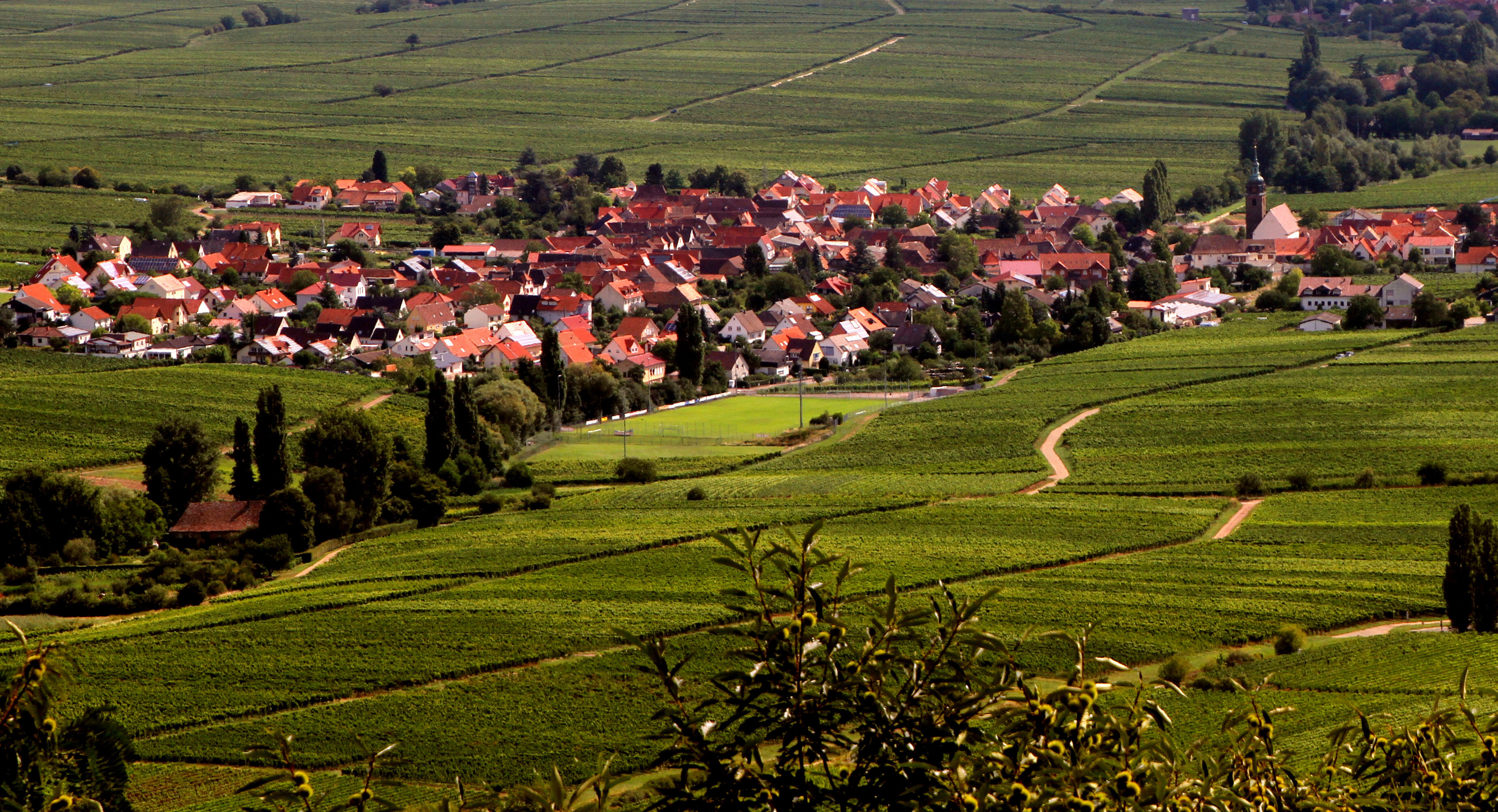 Hainfeld von St Anna-Kapelle